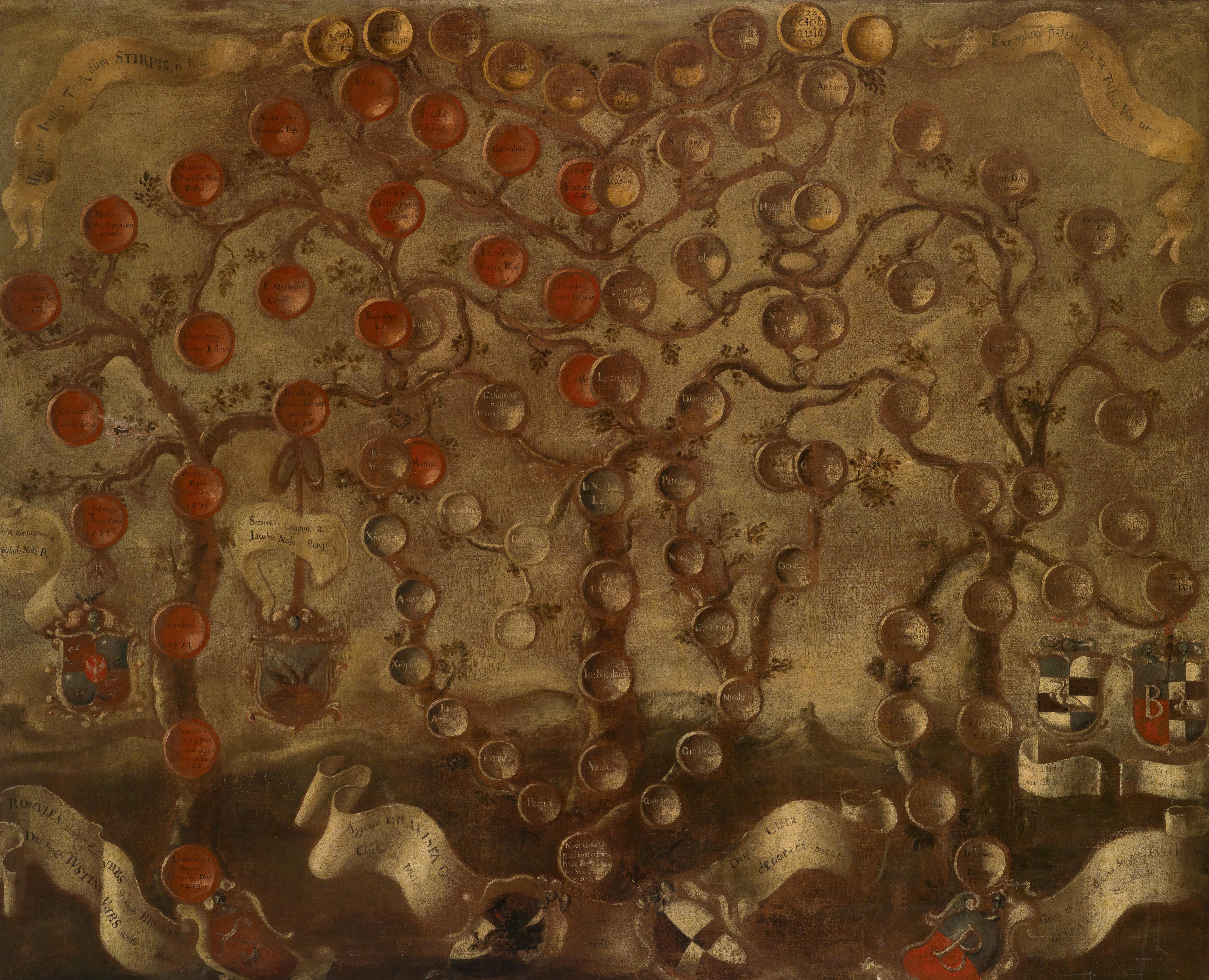 Stammbaum der aus Capodistria stammenden Familie der Grafen Gravisi. Venezianische Schule des 18. Jahrhunderts, Öl auf Leinwand, 132,5 x 165 cm